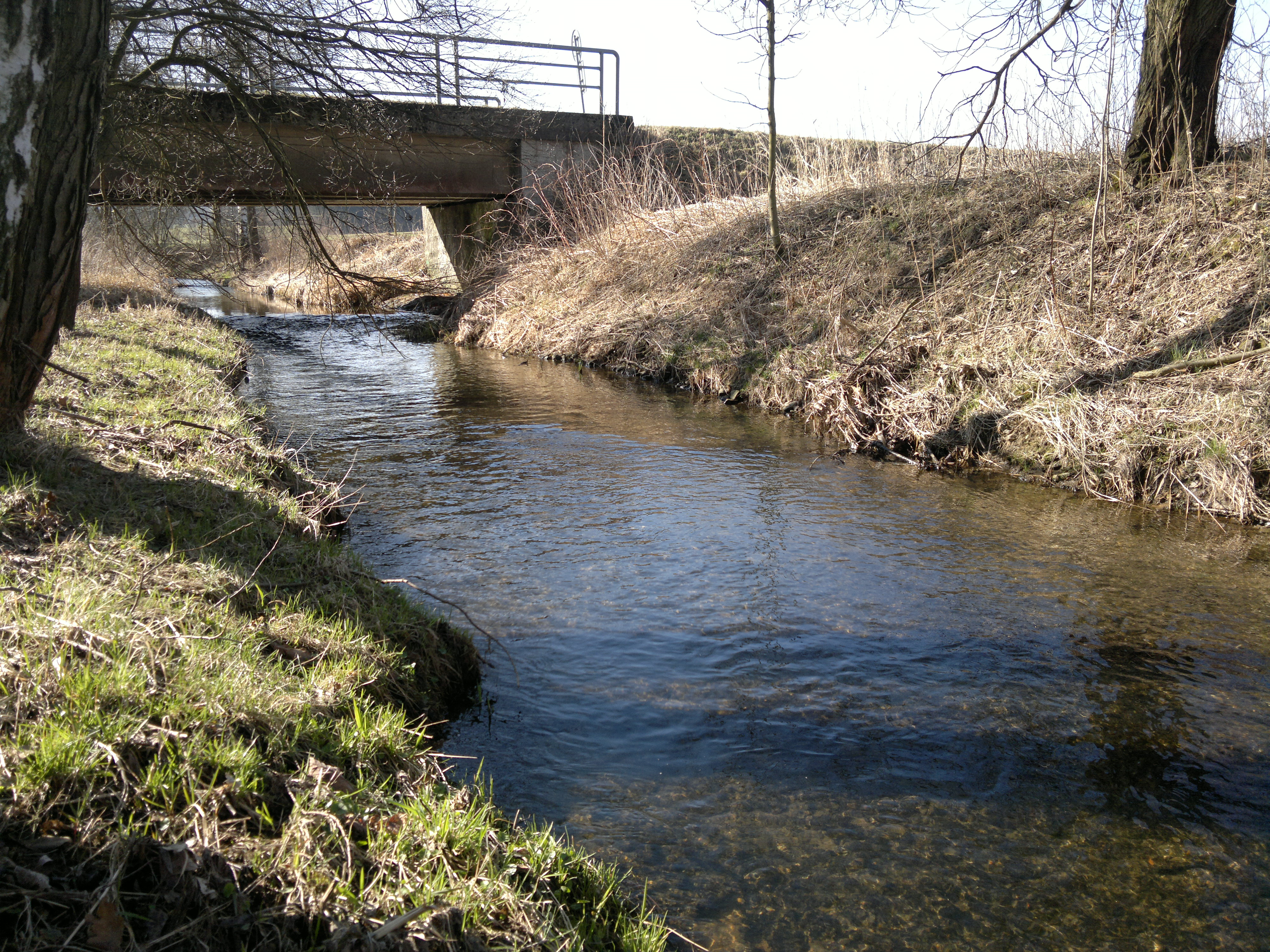 Cerhovka východně od Bezděkova v okrese Havlíčkův Brod